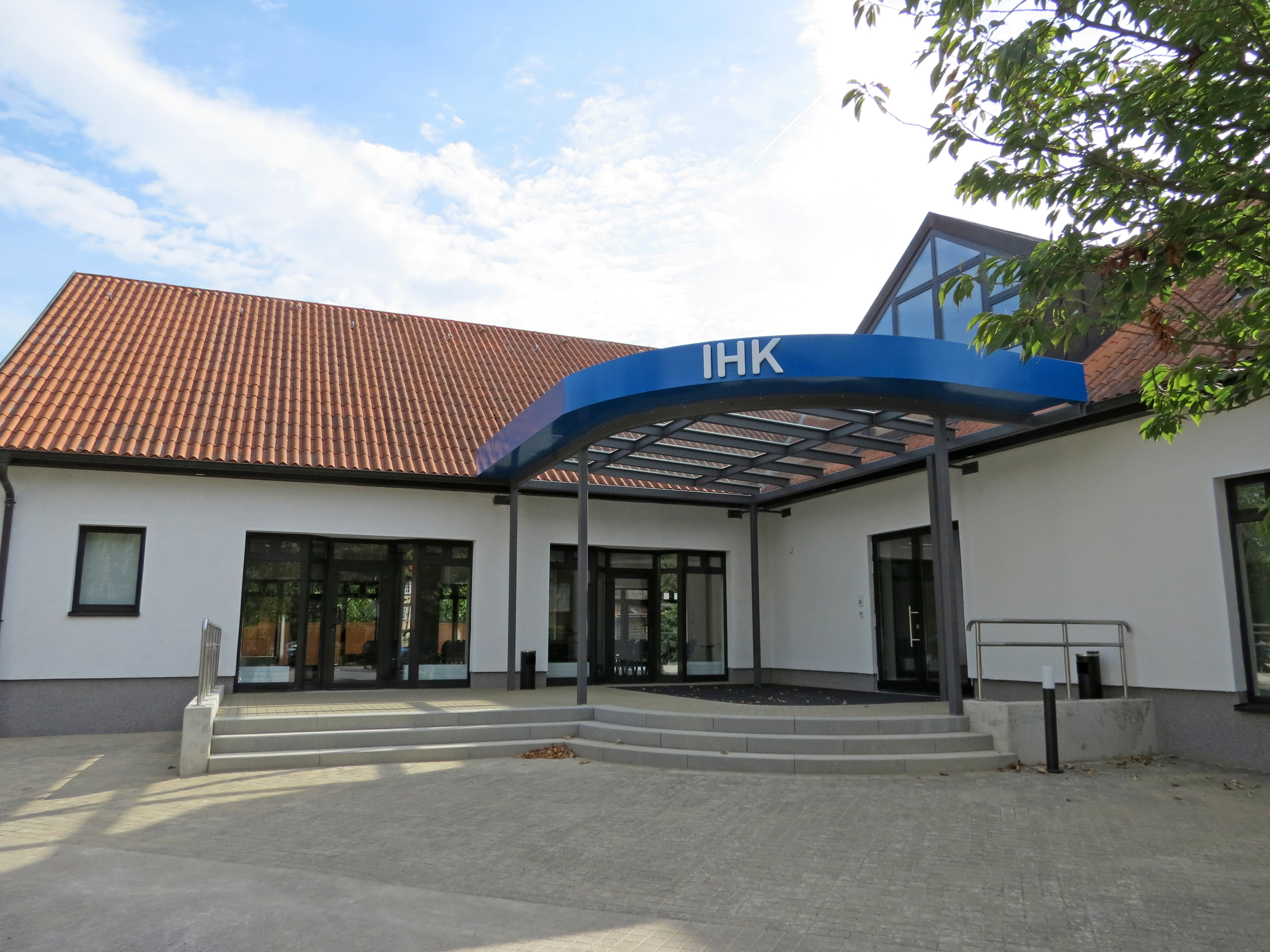 Das Gebäude der IHK-Geschäftsstelle in Wernigerode. Ursprünglich wurde es als Klubhaus des VEB Elektomotorenwerk errichtet und trug den Namen Leutnant Lutz Meier.